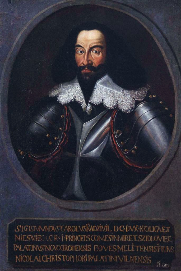 Беларуская (тарашкевіца): Партрэт Жыгімонта Караля Радзівіла (Žygimont Karal Radzivił)